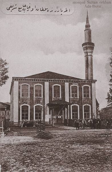 1894 depreminde hasar gören caminin 1901 yılında yeniden yapılması.